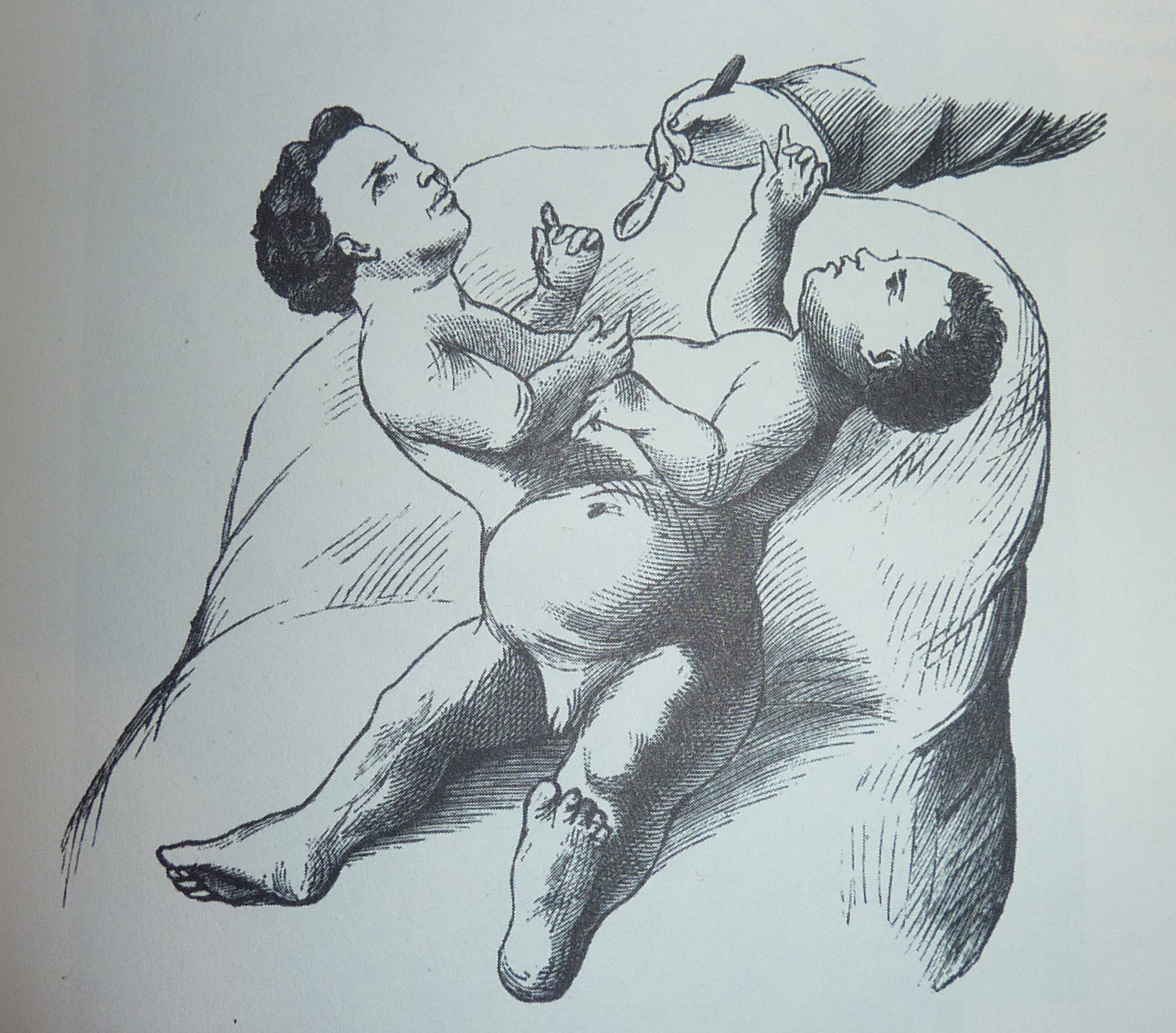 Giovanni Battista (rechts) und Giacomo (links) Tocci